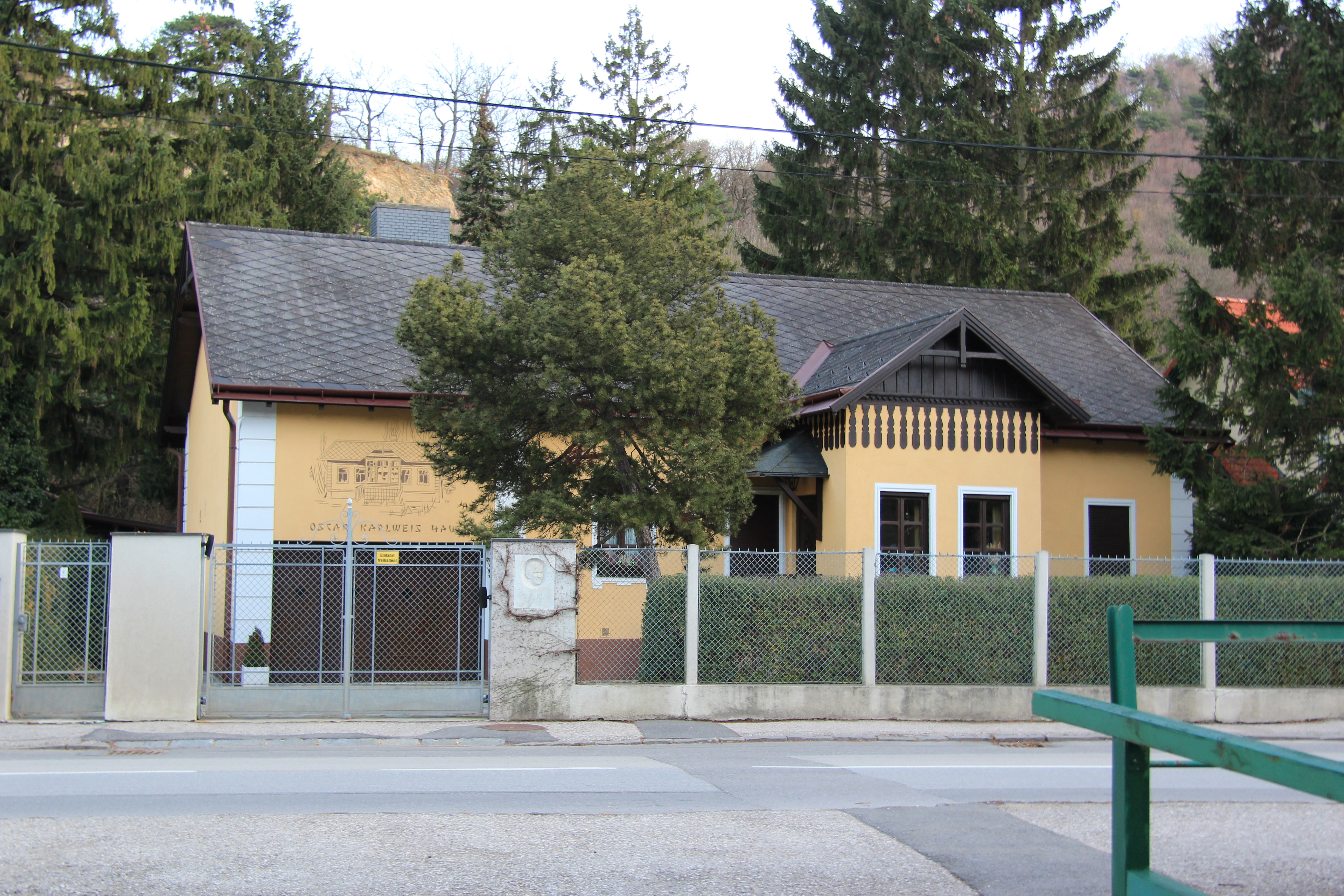 Geburtshaus des Schauspielers Oskar Karlweis in der Hinterbrühl